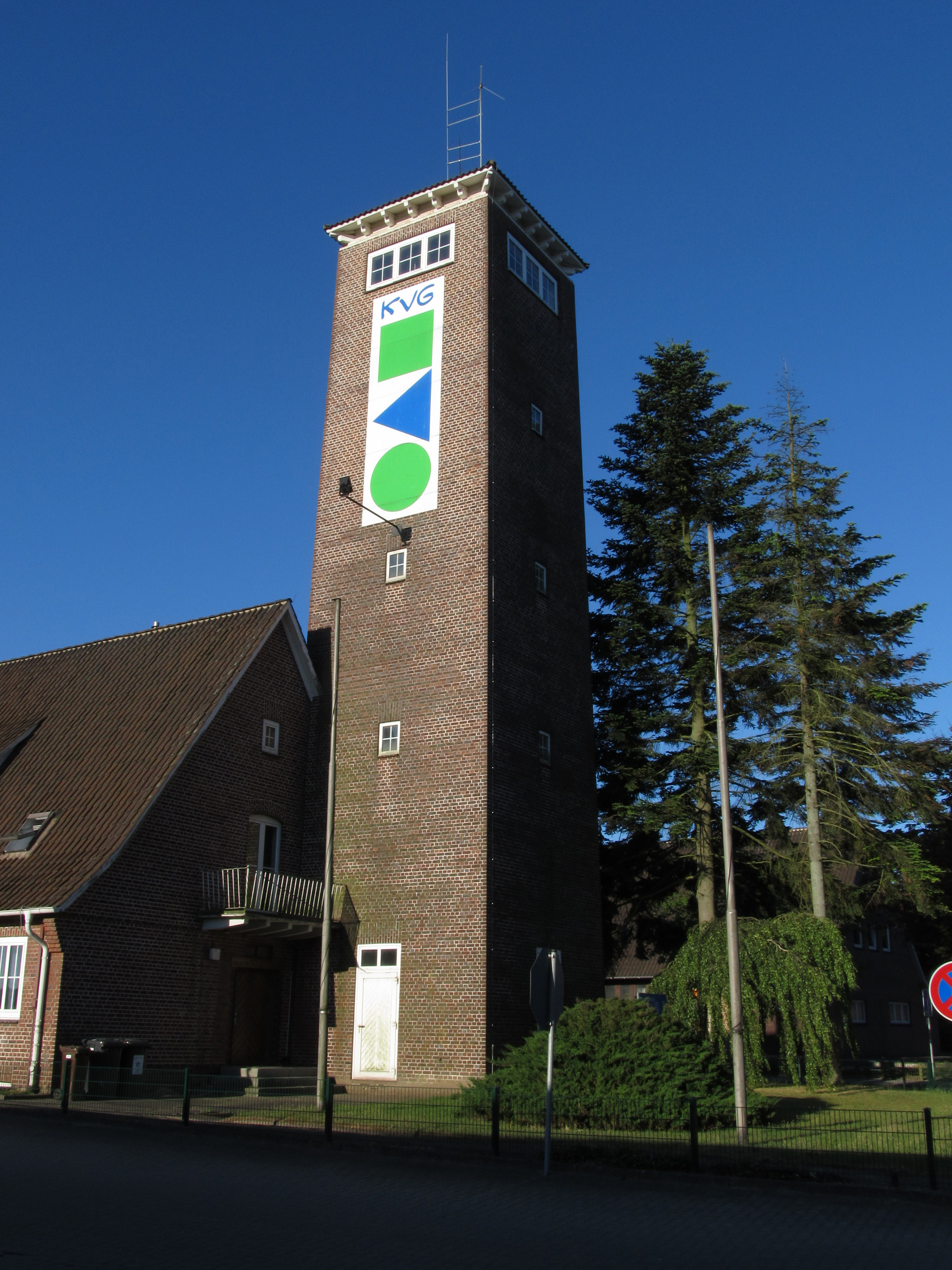 Der alte Schlauchtturm der Stader Feuerwehr nun als Werbefläche beim KVG Zentrum.